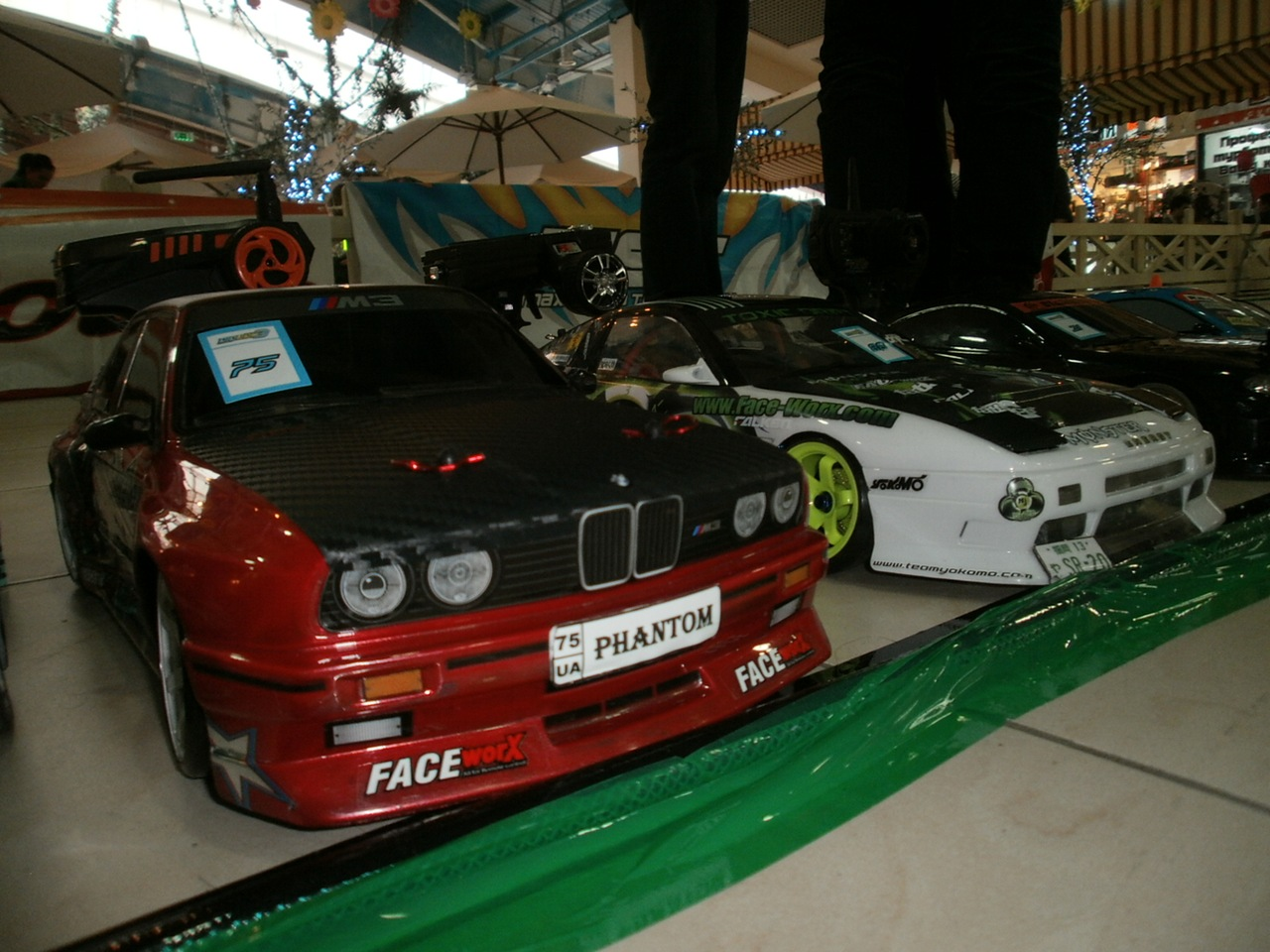 РУ модели на финале чемпионата Украины по RC Дрифту. Киев 3.12.2011